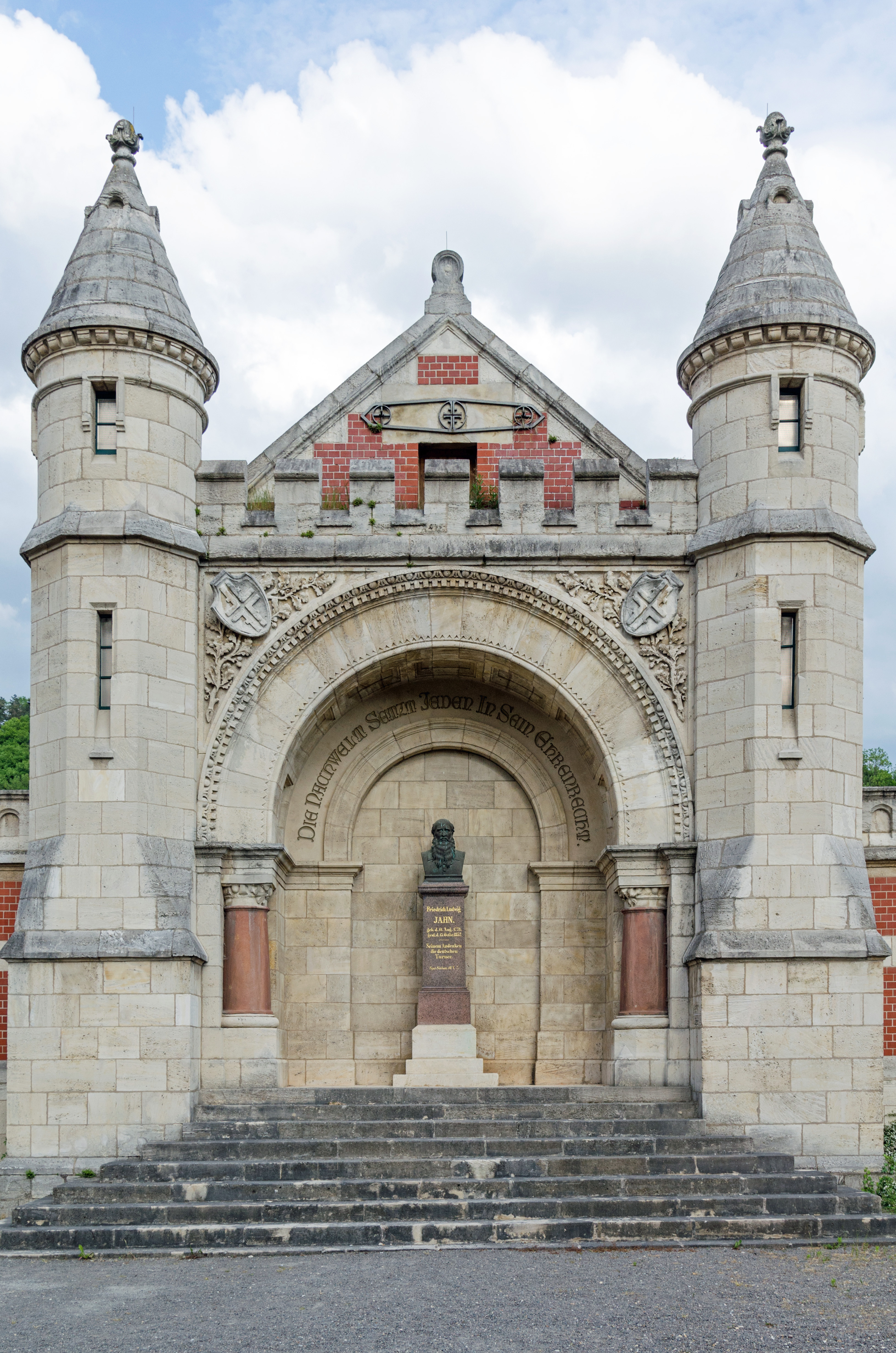 Freyburg an der Unstrut, Oberstraße 9, Turnhalle